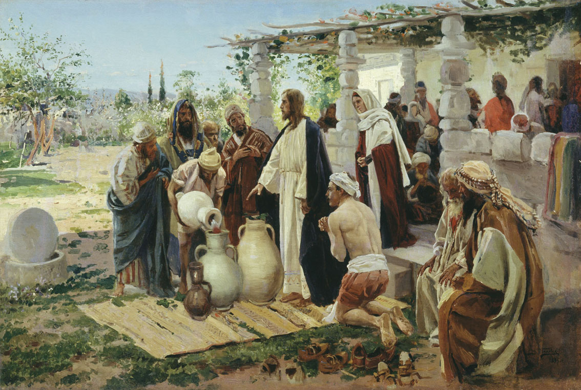 Жанр: Религиозная живопись Направление: Реализм Год: 1887 Тип объекта: Картина Местонахождение: Витебский художественный музей Материал: Холст, масло